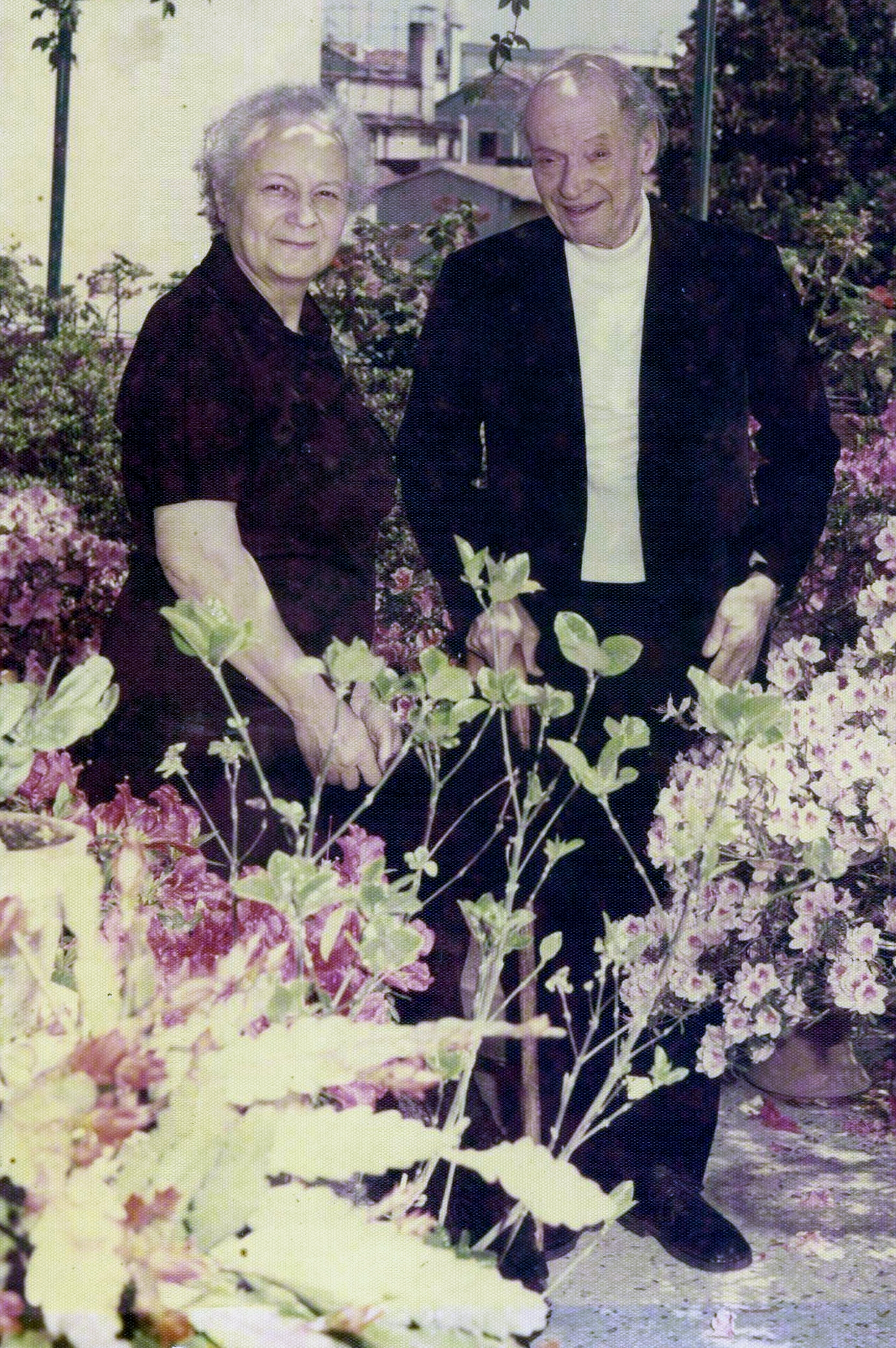 Eva Riccioli Orecchia con il maestro Vito Frazzi 1974